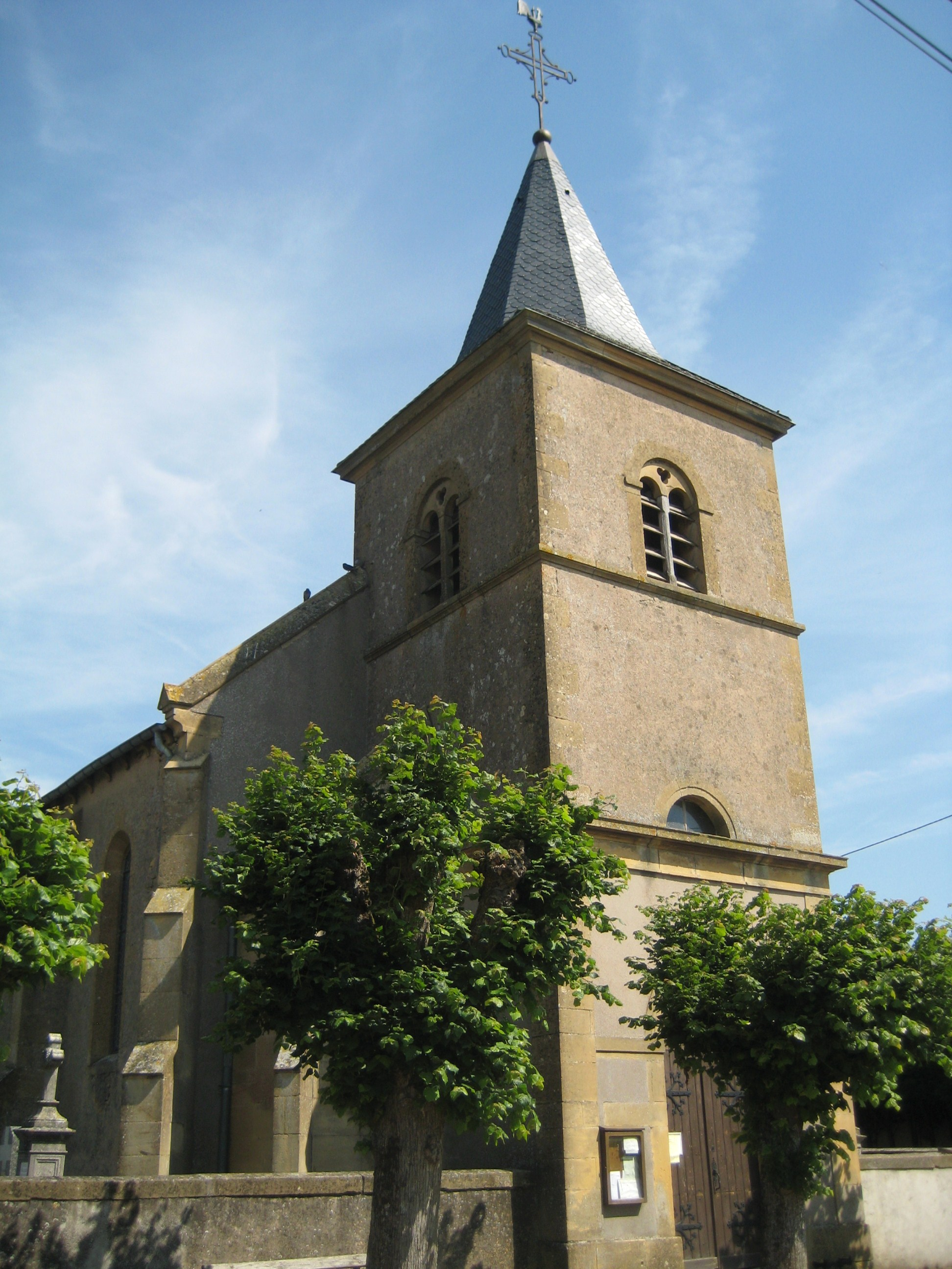 Description Église paroissiale Saint-Jacques-le-Majeur des BarochesDate 26 June 2009Source mon appareil photoAuthor Aimelaime Église paroissiale Saint-Jacques-le-Majeur des Baroches